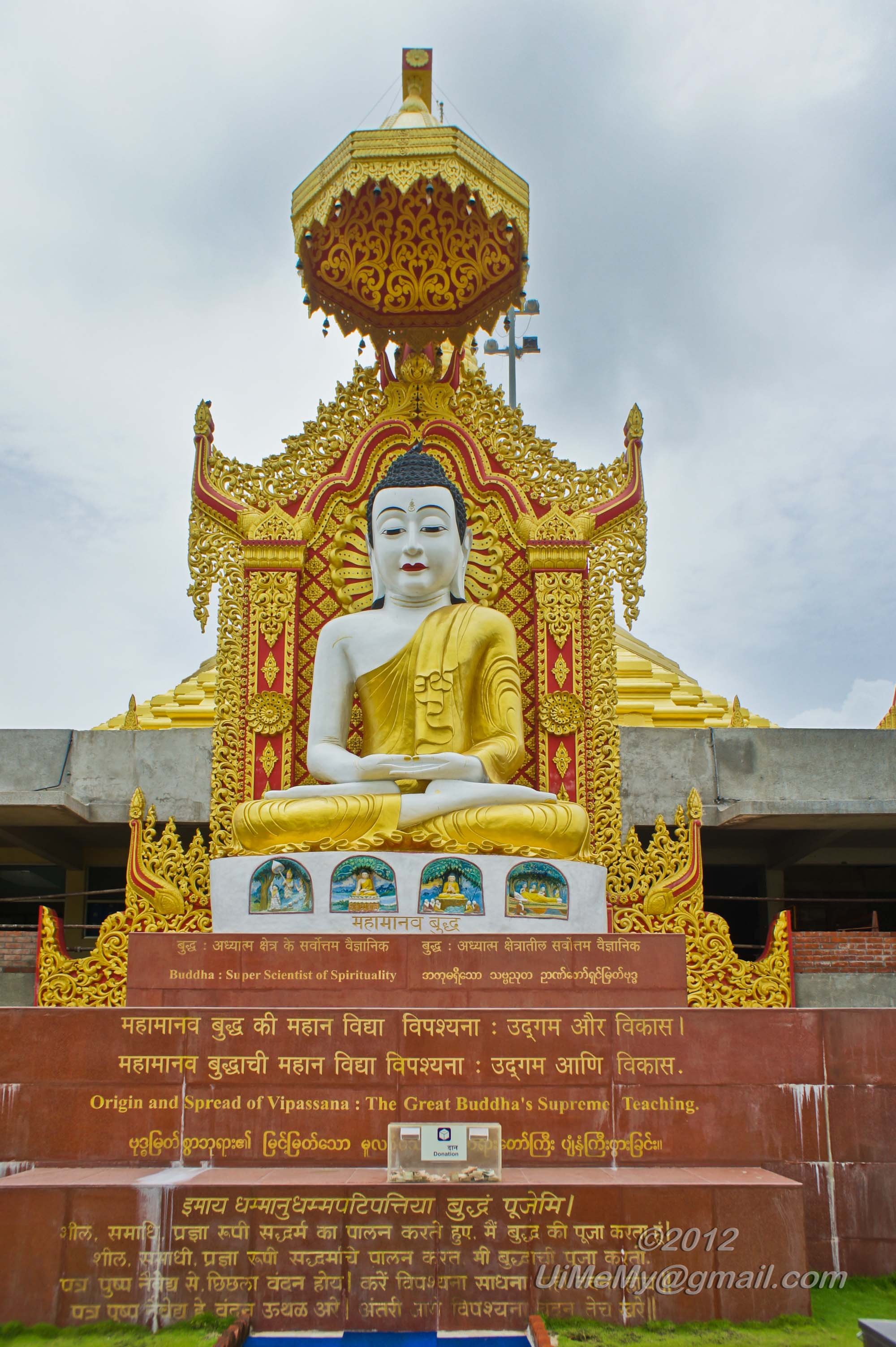 Global Pagoda,Gorai,Meera Rd-Bhayandar